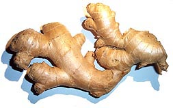 Rhizome de gingembre